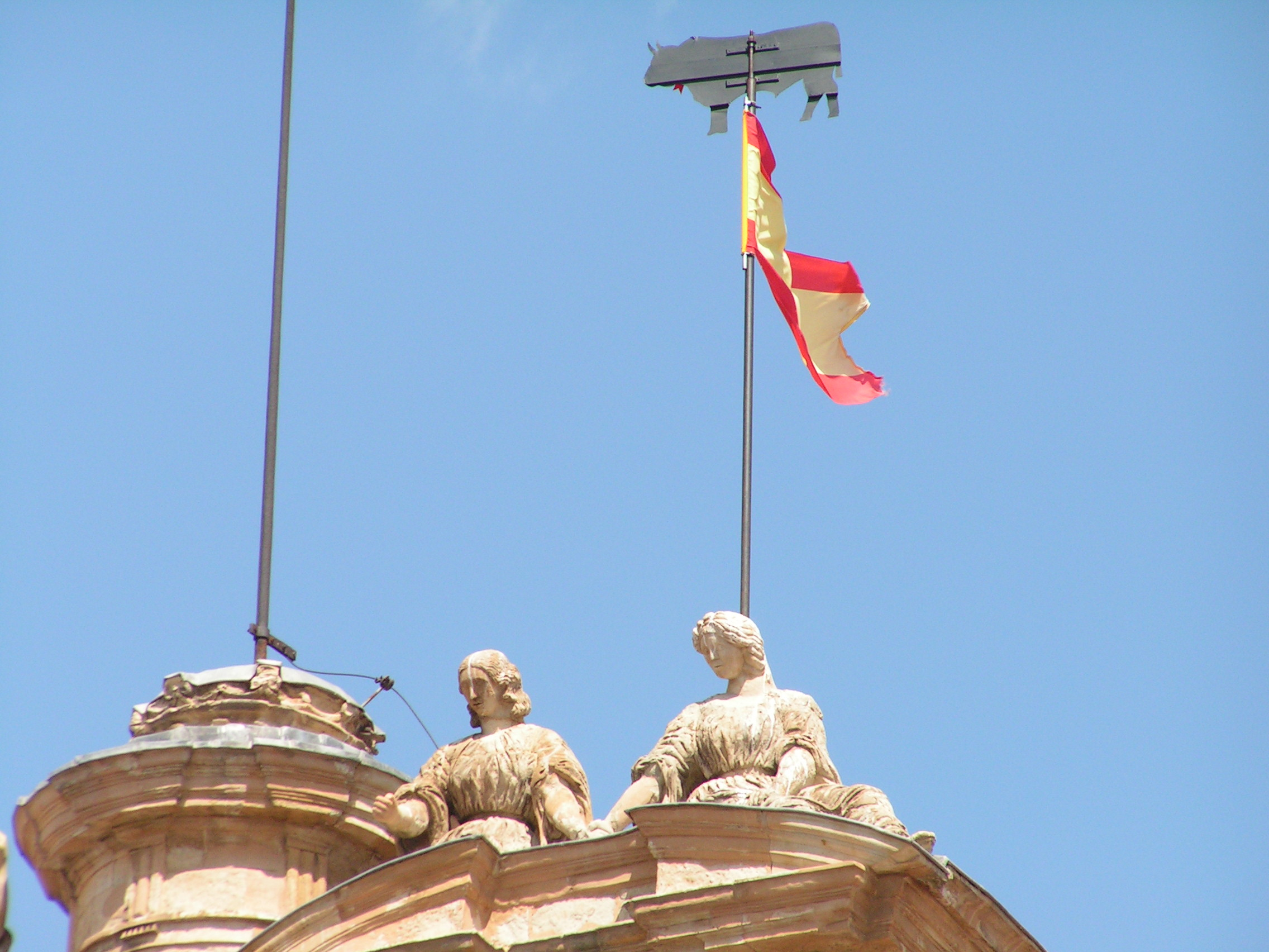 La mariseca, veleta rematada con un toro, anunciando la llegada de las Ferias y Fiestas en la espadaña del Ayuntamiento de Salamanca.